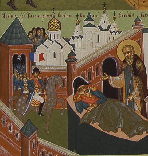 Французские войска входят в Сторожевский монастырь с целью грабежа обители. Явление Святого Саввы Евгению Богарне. Клеймо 23. Икона Святой Савва Сторожевский с житием.